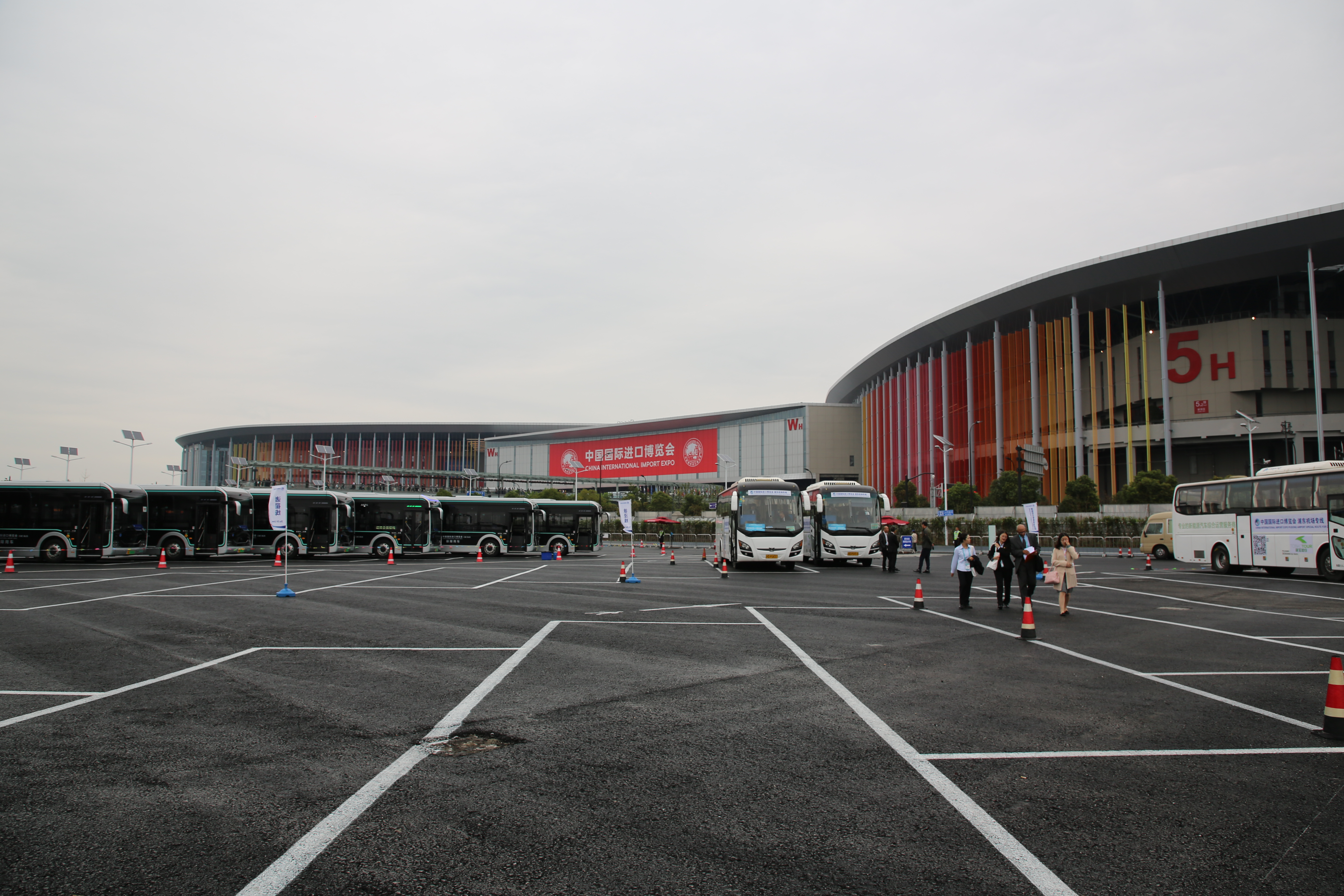 Shanghai. China